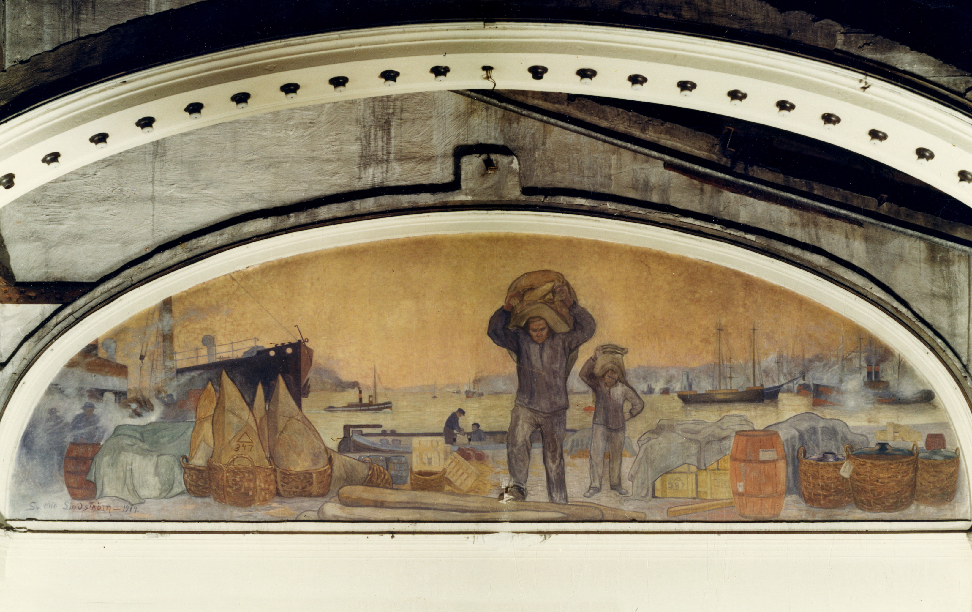 Nya Banken i kvarteret Snäckan, målning av Otto Lindström på banksalens östra vägg